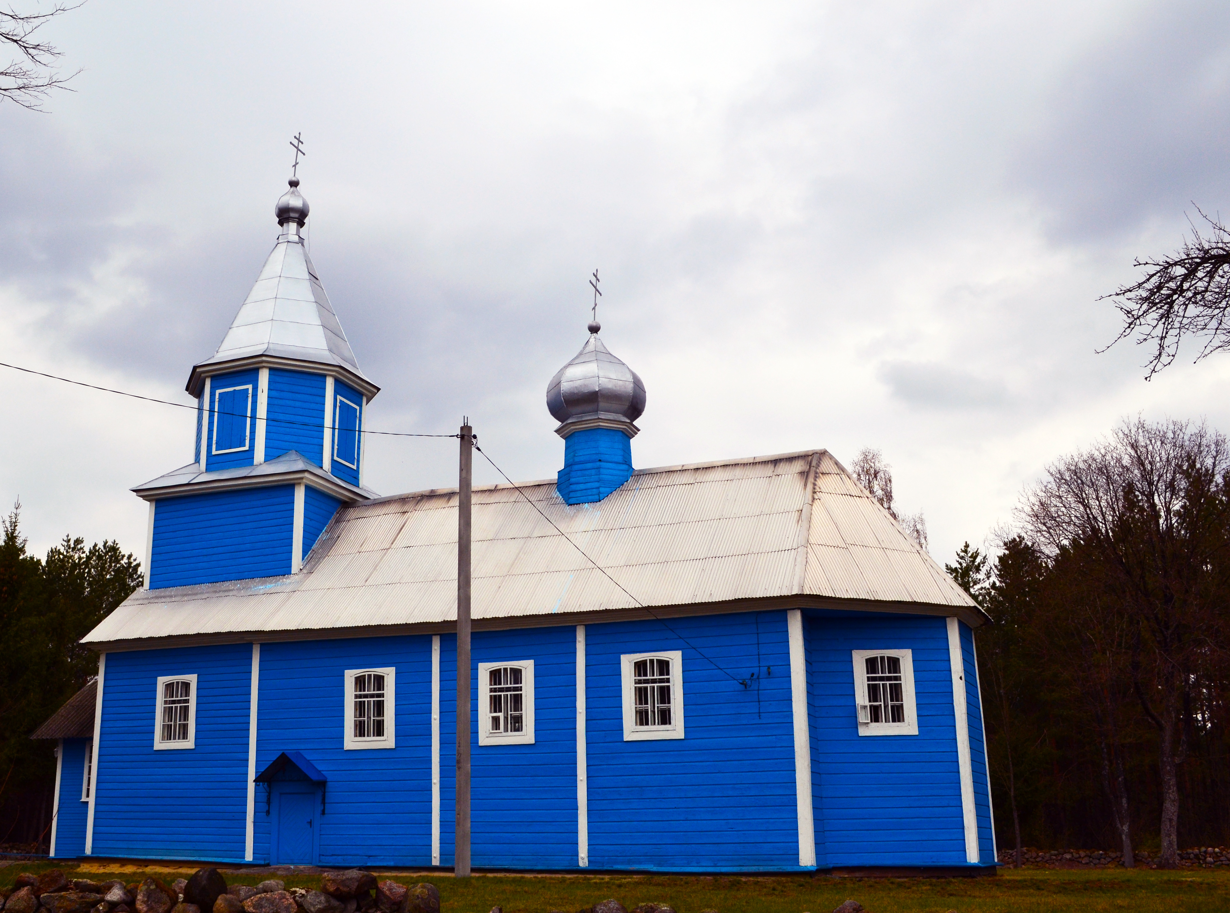 Беларуская (тарашкевіца): Царква сьвятога Мікалая ў Вежным (Пружанскі раён) This is a photo of Belarusian heritage monument. Reference number: 113Г000604 ( WLM)